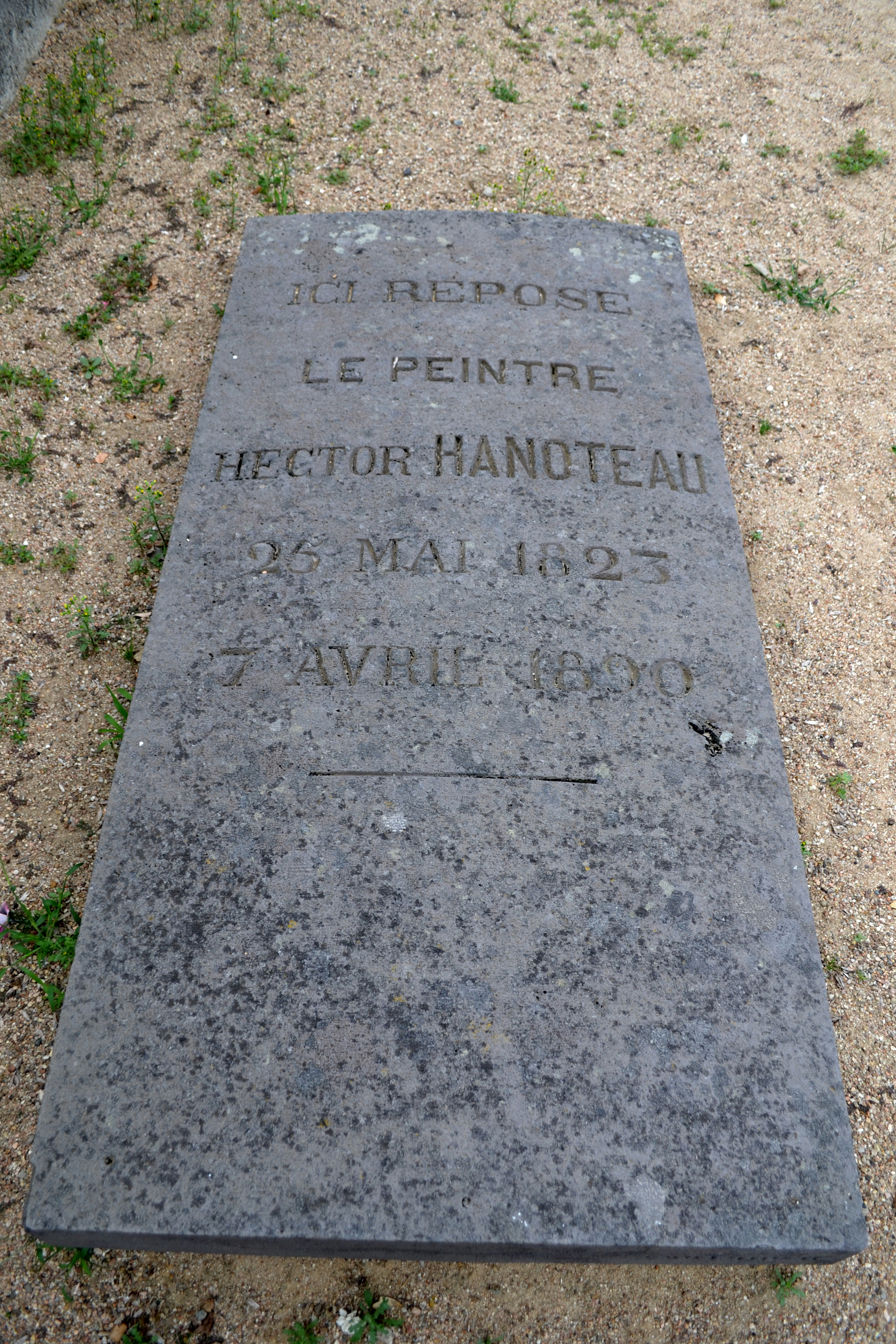 Tombe du peintre nivernais Hector Hanoteau (1823-1890) à Cercy-la-Tour (Nièvre).